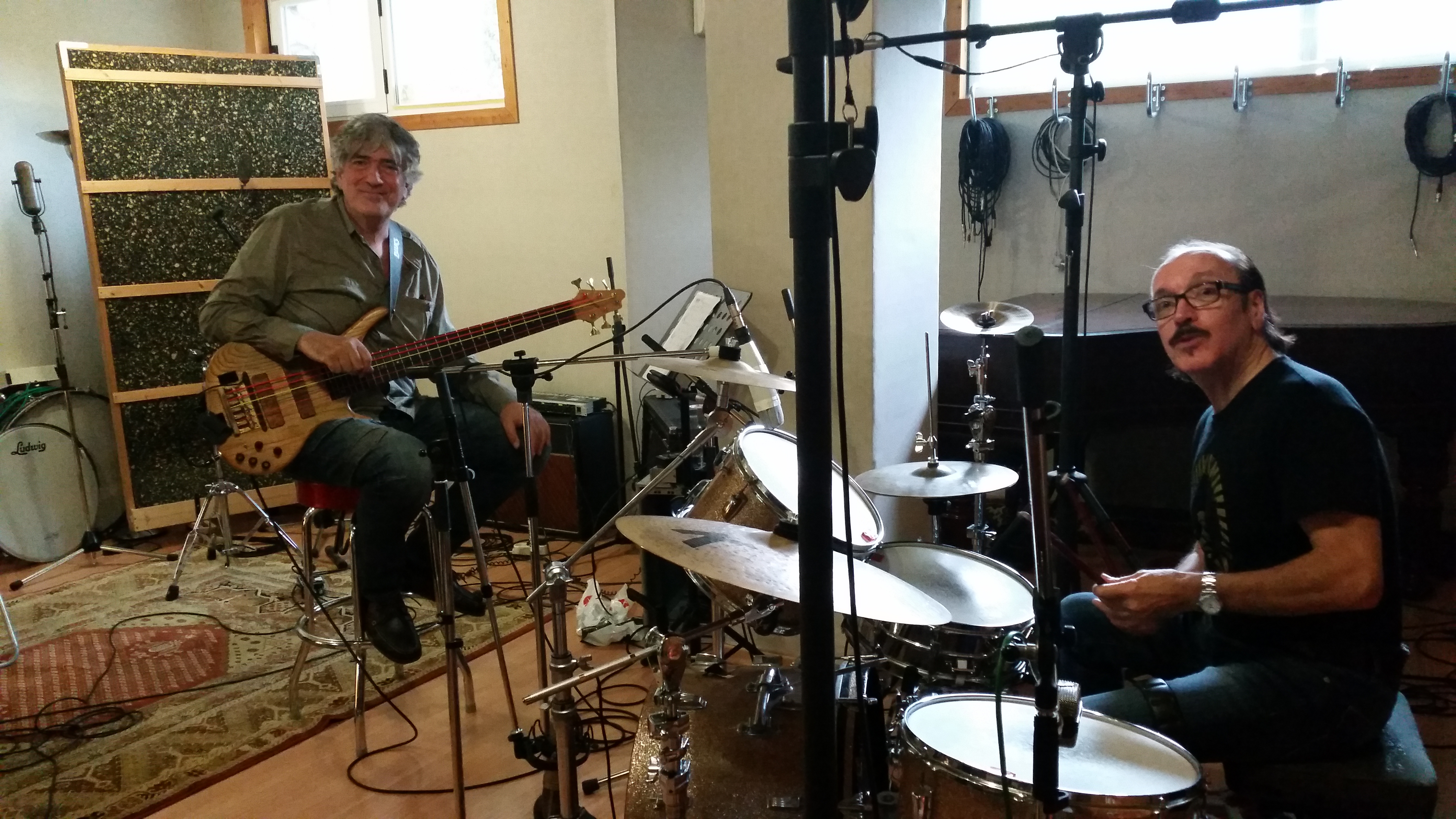 Grabando con Daniel Irigoyen para Rock Argentino en Estado Sinfónico, Madrid, 2015